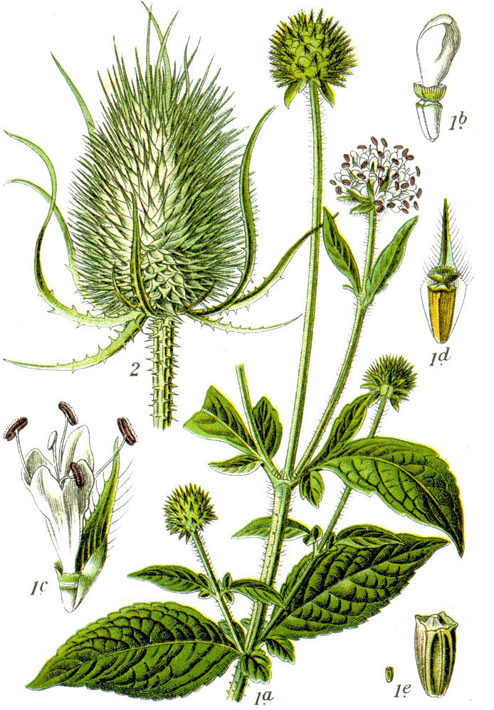 1. Dipsacus pilosus L. 2. Dipsacus fullonum L., syn. Dipsacus sylvestris Huds. Original Caption 1. Hirtenstab, Dipsacus pilosus 2. Wilde Karde, Dipsacus silvestris